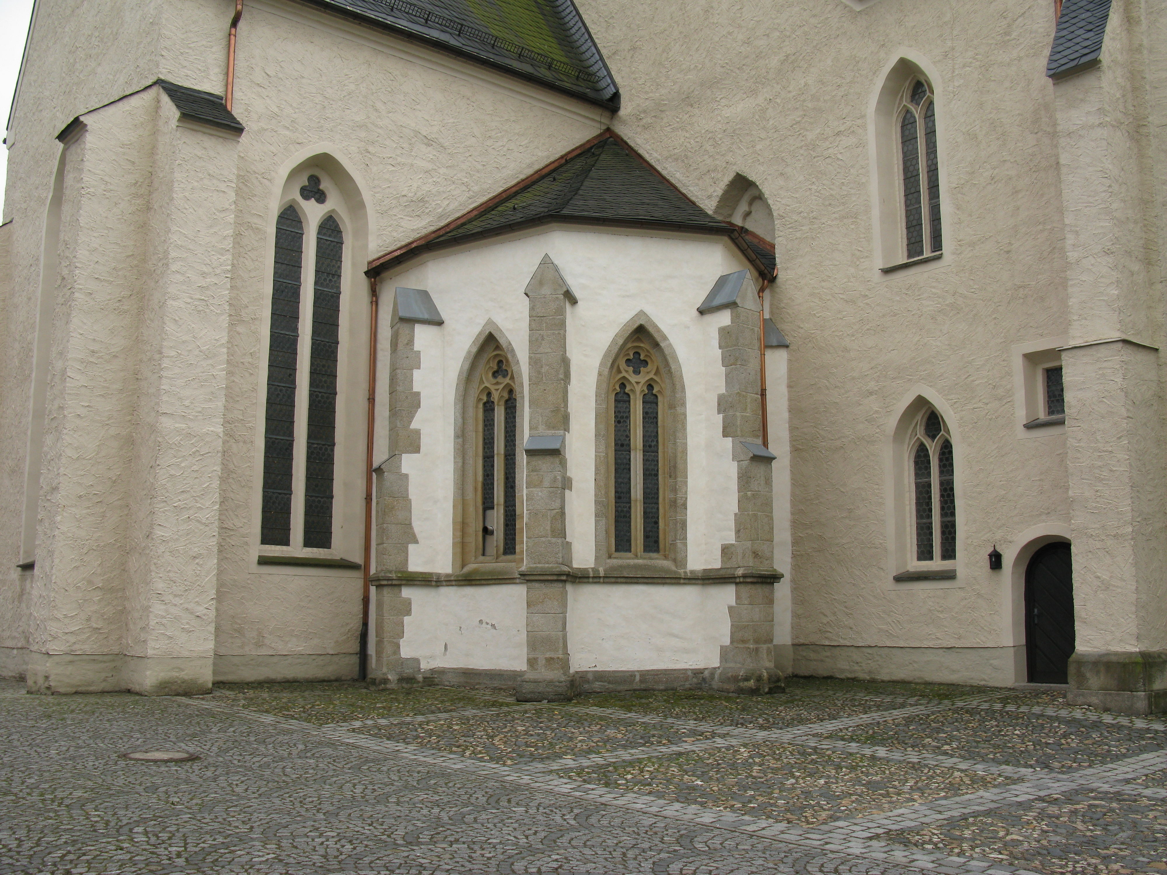 Plauen, Johanniskirche: Außenansicht der Kapelle der Vögte